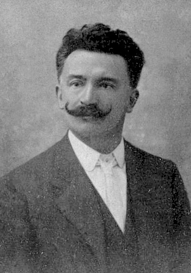 Emilio Caldara